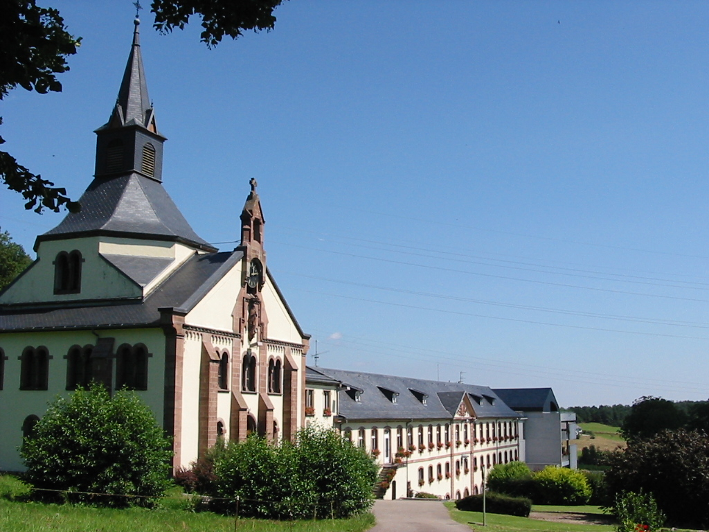 Maison de retraite et église bâtis sur les ruines de l'abbaye de Pairis à Orbey